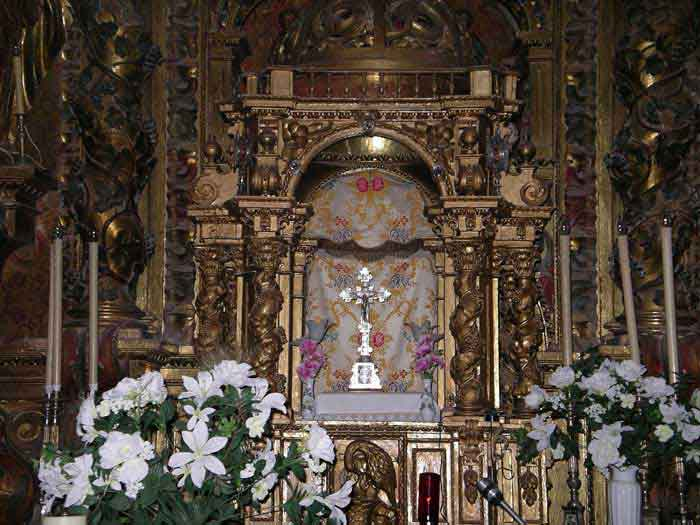 Retablo mayor